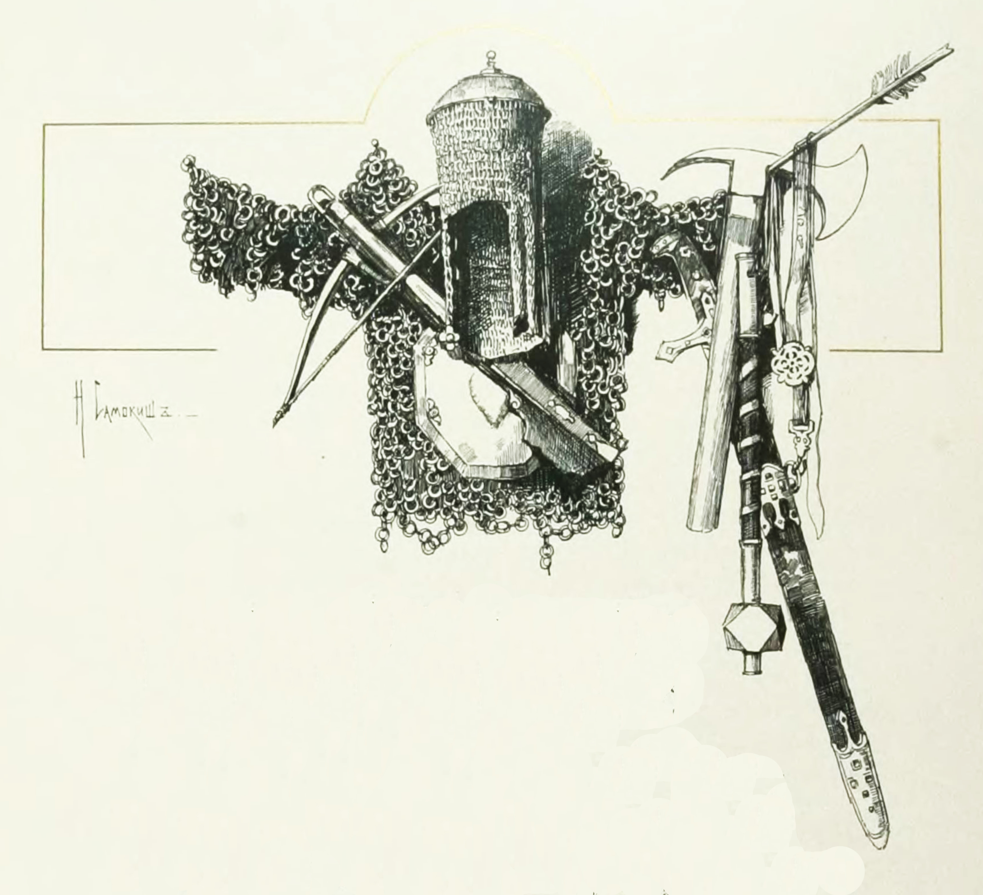 Древние доспехи: мисюрка, байдана, самострел, булава, меч и топор. С рис. Н. Самокиша. [описание источника]